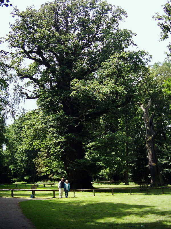 Stiel-Eiche in Ivenack (D), selbst fotografiert im Juli 2004, GNU-FDLRomână: Stejar în Ivenack